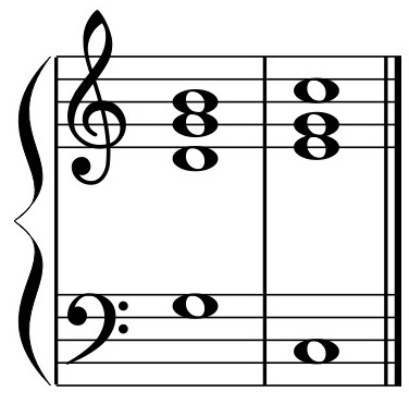 Příklad celého závěru (rozvod dominanty do tóniky v C dur)